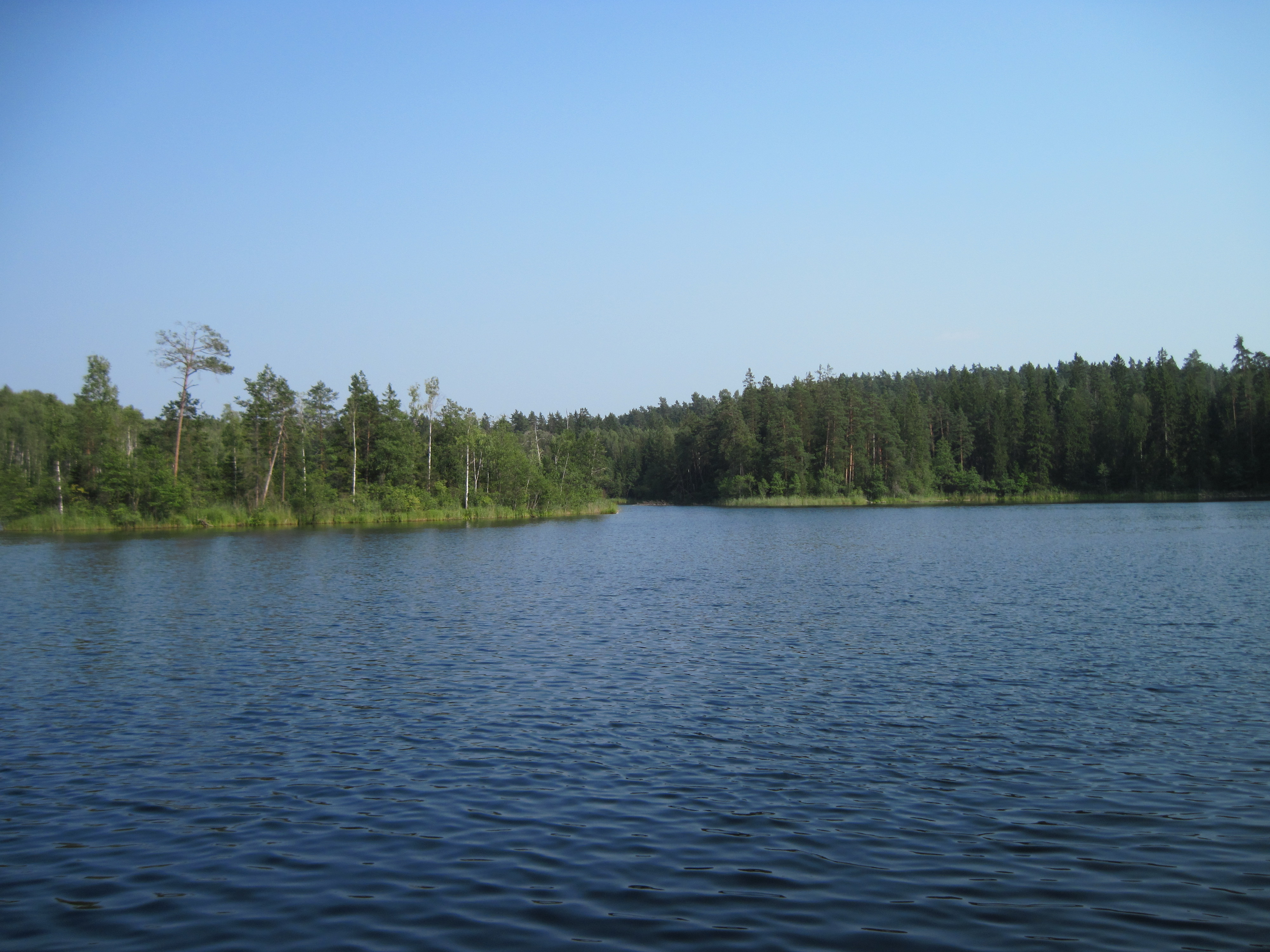 Возера Глубелька. Блакітныя азёры